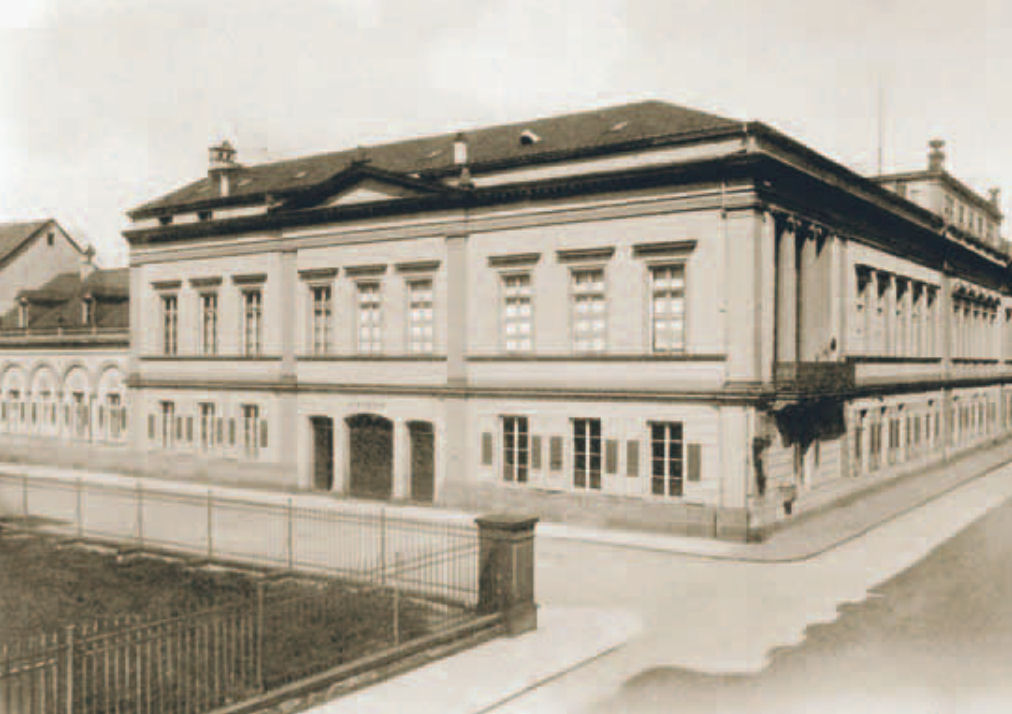 Das Gebäude des Casinos zu Coblenz in Koblenz